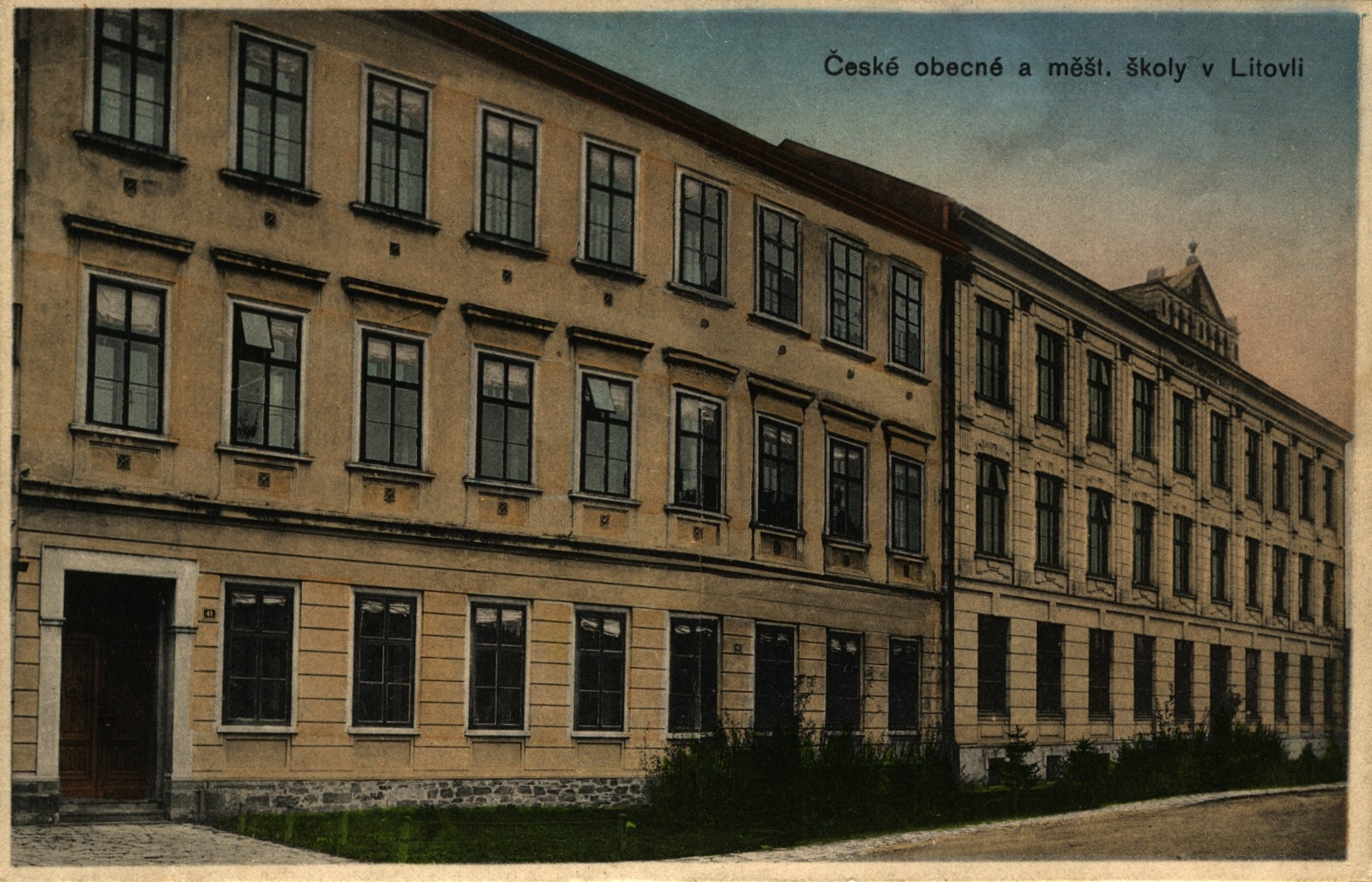 Škola v Jungmannově ulici v Litovli. Vydavatel Leopold Kořínský